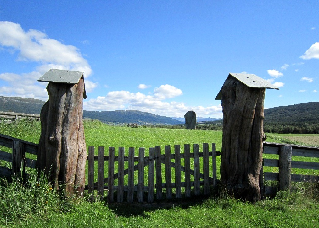 Lesja gamle kirkested